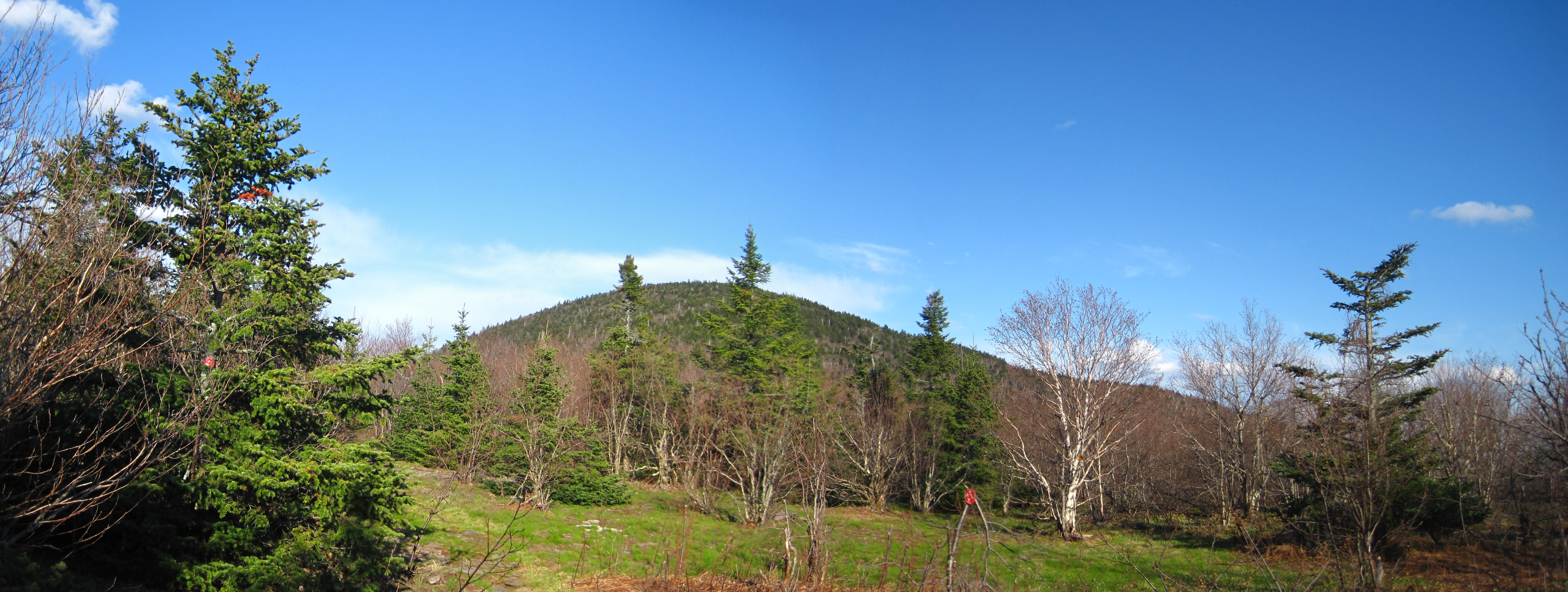 Looking E.